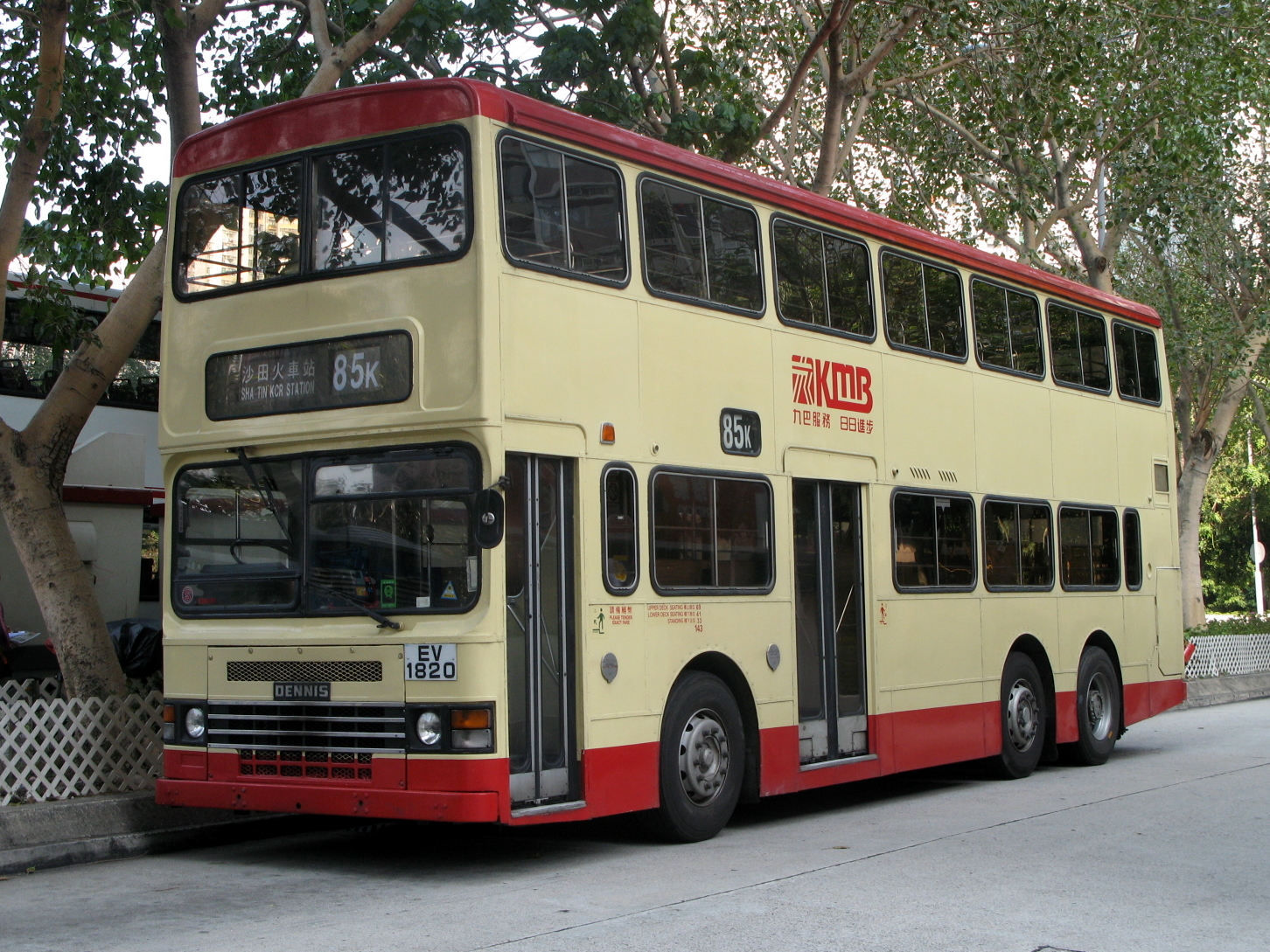 KMB Dennis Dragon 11m (S3N)